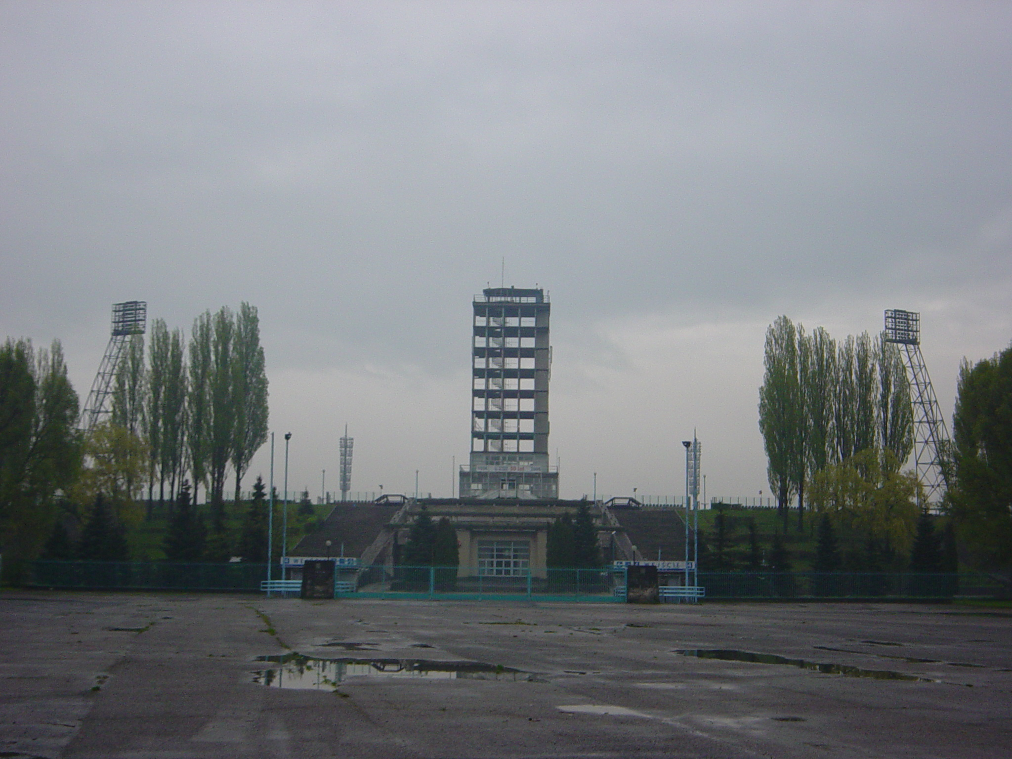 Stadion Śląski w Chorzowie